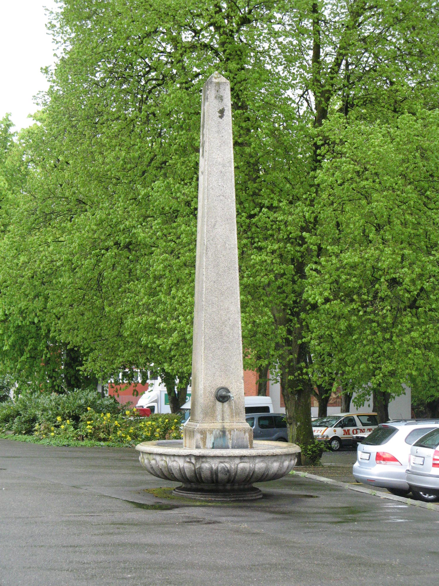 Obeliskbrunnen beim Bezirksgebäude in Baden